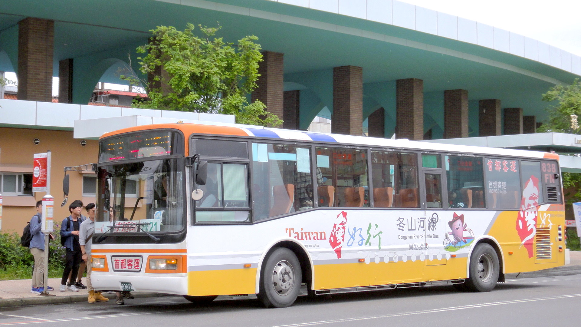 首都客運日野RK8JRSA大客車838-FN行駛宜蘭縣公車綠21路，臺灣好行冬山河線塗裝。